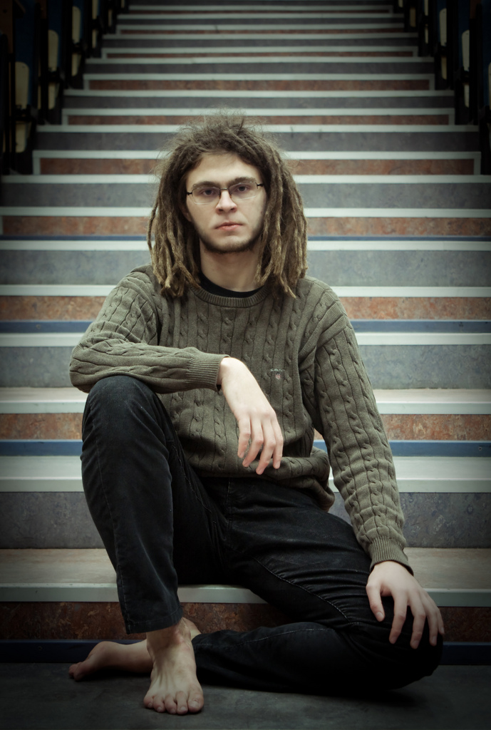 Margus Niitsoo detsembris 2010, tollal veel TÜ informaatikadoktorant.